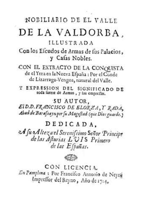 Francisco de Elorz, Nobiliario de la Valdorba. Francisco Antonio de Neira, 1714, Pamplona